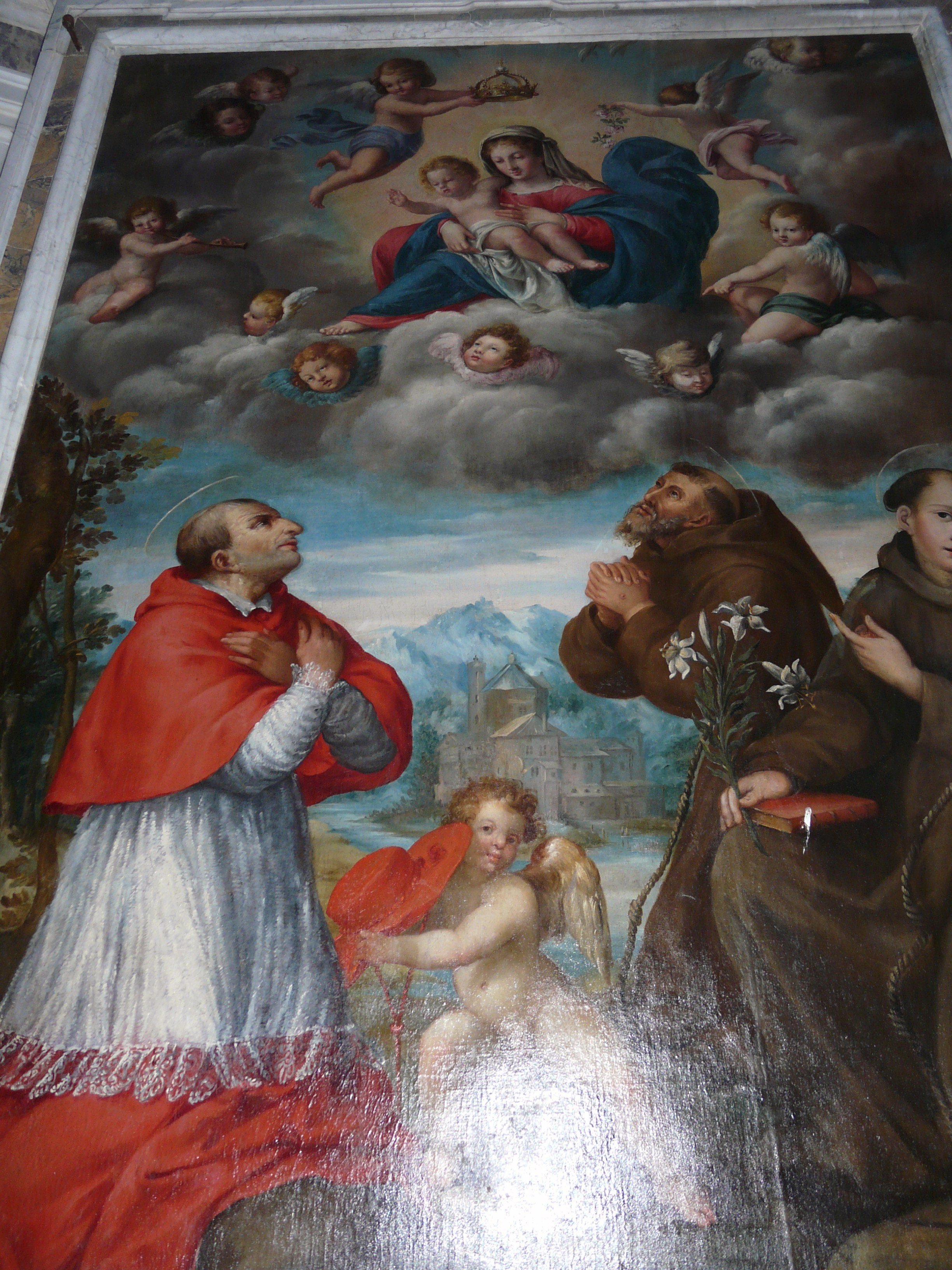 Oratorio dei Bianchi, Fosdinovo, Toscana, Italia